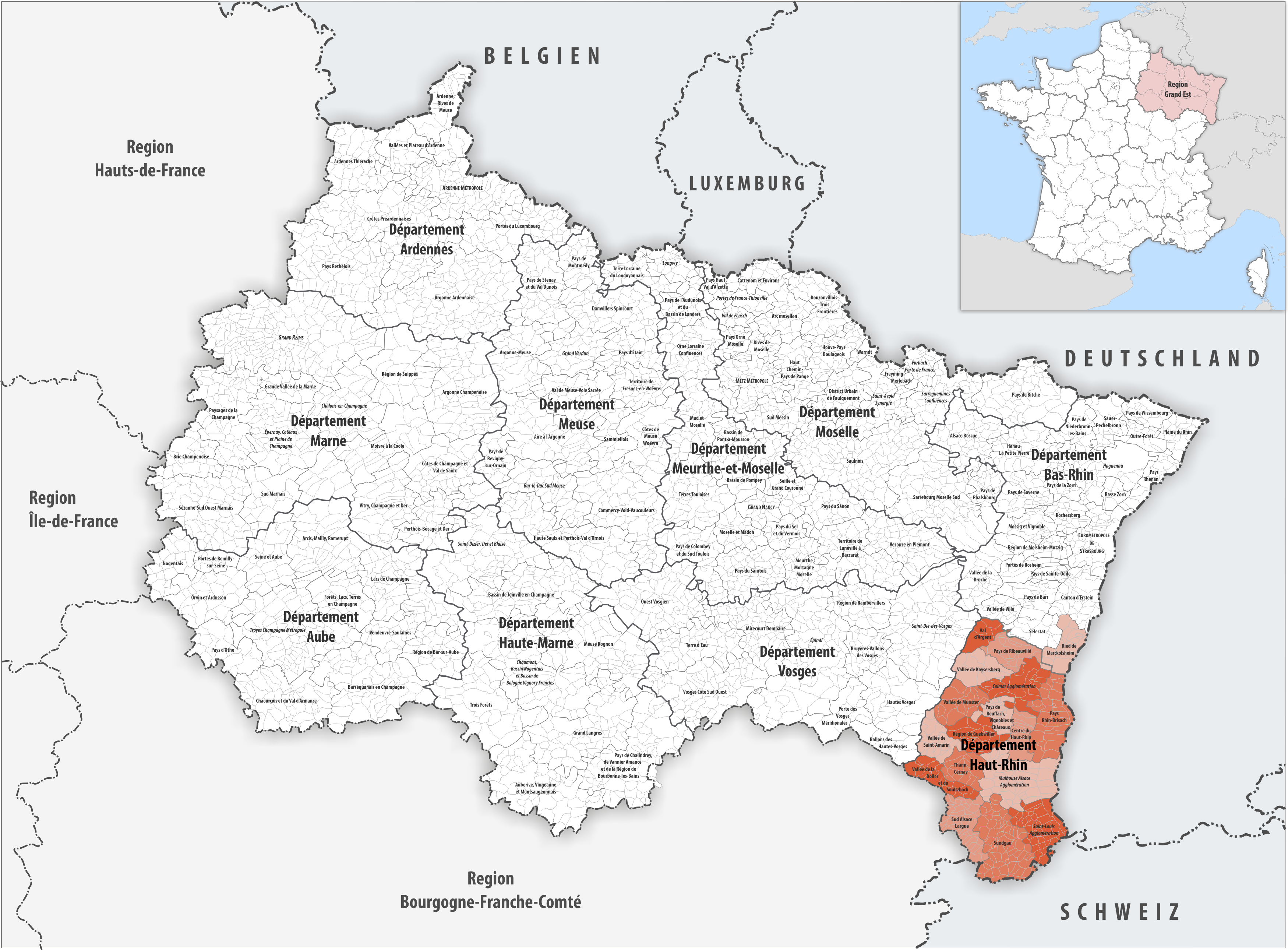 Gemeindeverbände im Département Haut-Rhin